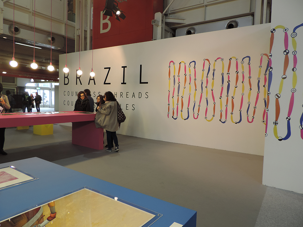 Ministra participa da abertura Oficial da Feira do Livro para Crianças e Jovens de Bolonha e da Inauguração da Exposição de Ilustradores Brasileiros no Pavilhão do País Convidado de Honra (Brasil) 24.03.2014 Foto: Priscila Costa e Silva